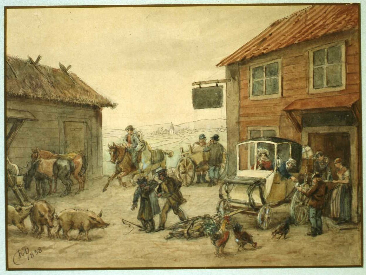 Akvarell av Fritz von Dardel, 1838. En skjutsbonde blir utskälld (av hållkarlen?) och en kommer med sina hästar.